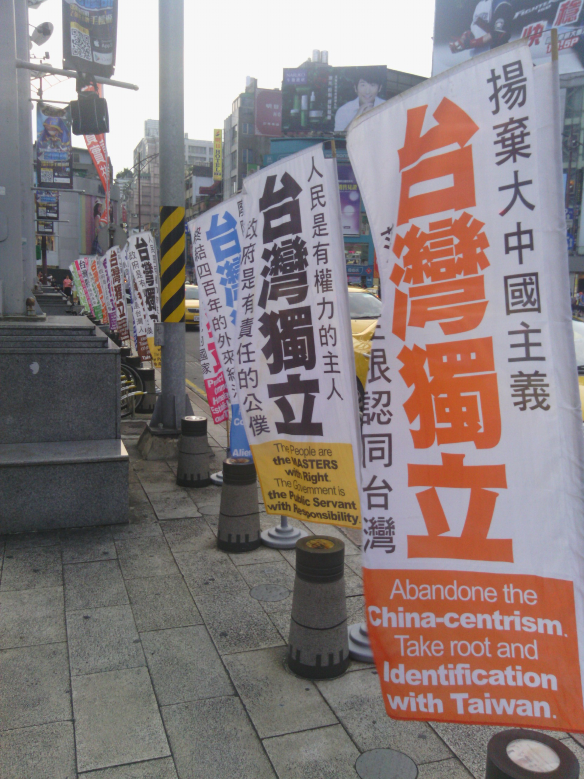 臺北捷運西門站附近的臺灣獨立運動關東旗。